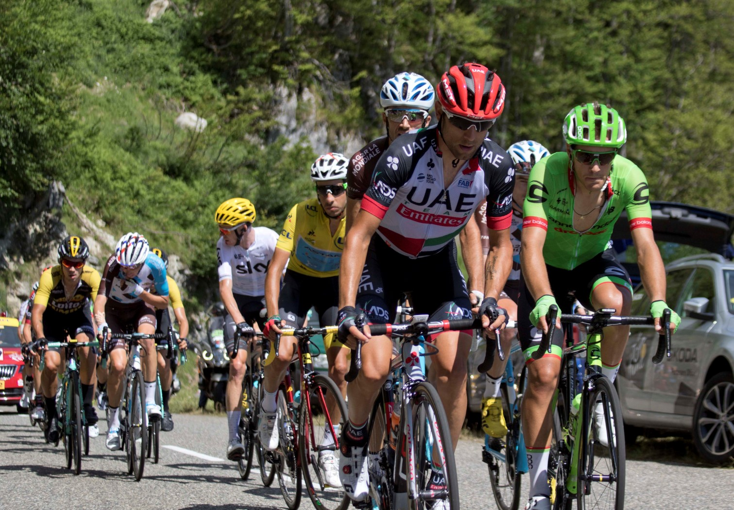 14-7_4 groep gele trui